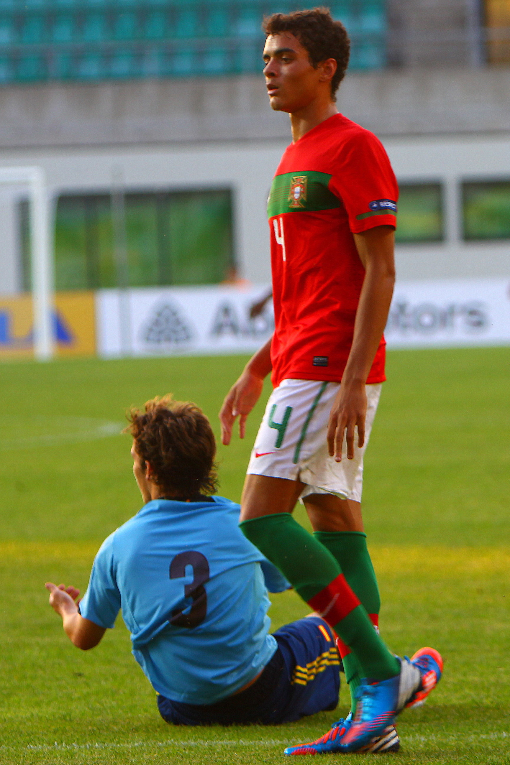 U-19 Portugal vs Spain.